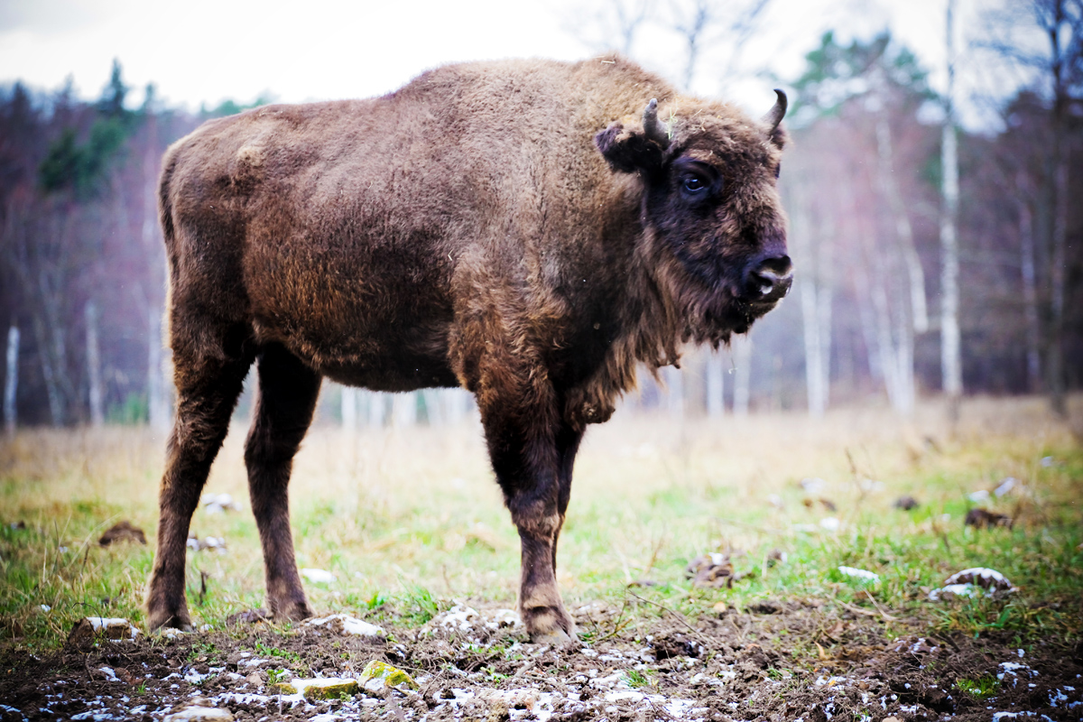 Moscow region. Приокско-террасный биосферный заповедник.